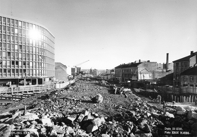 Det som skal bli Biskop Gunnerus' gate, ved byggingen av Jernbanetorget stasjon, 23. oktober 1963. Husene til høyre ligger i det som var Vognmannsgata.